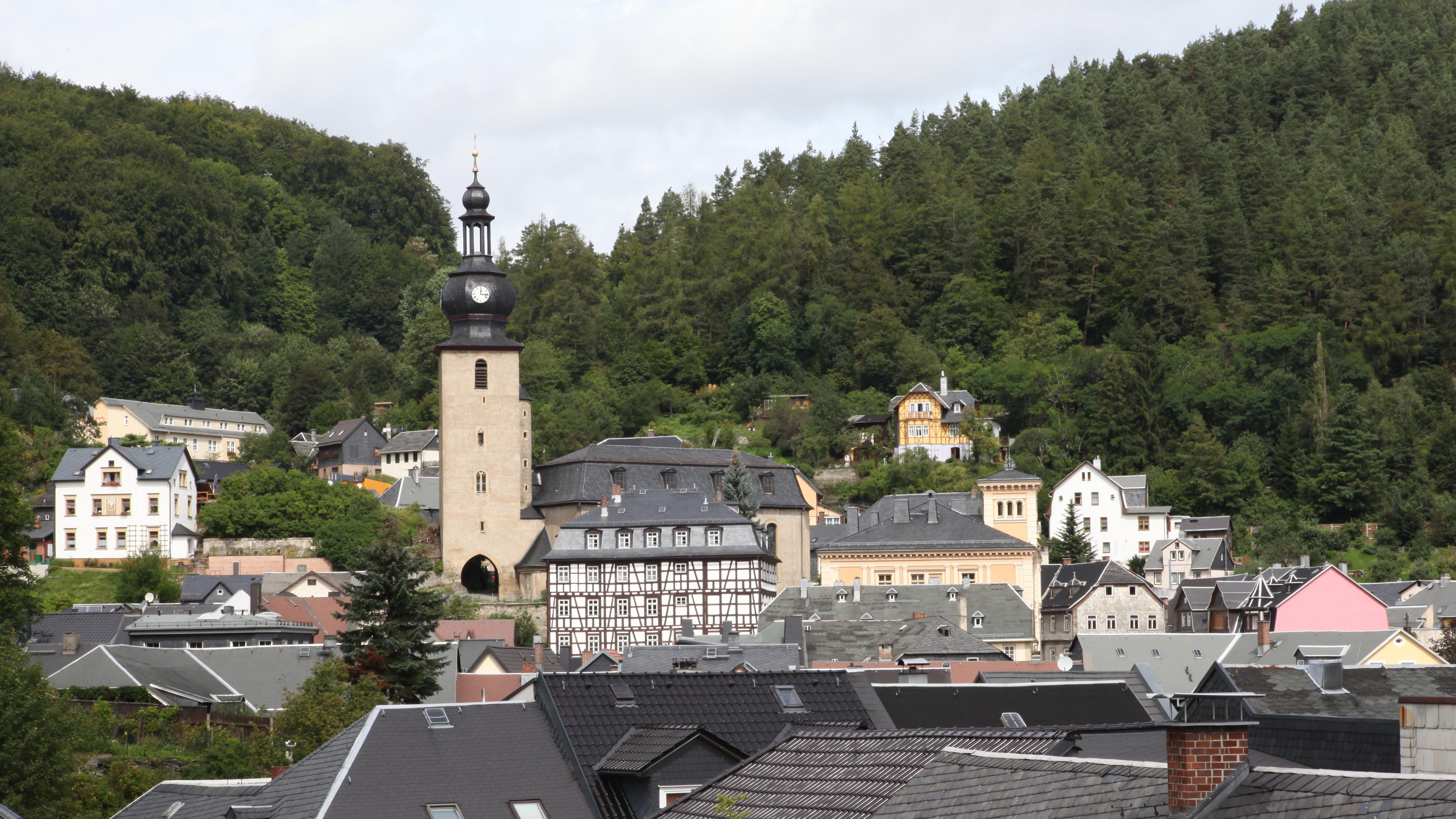 Gräfenthal